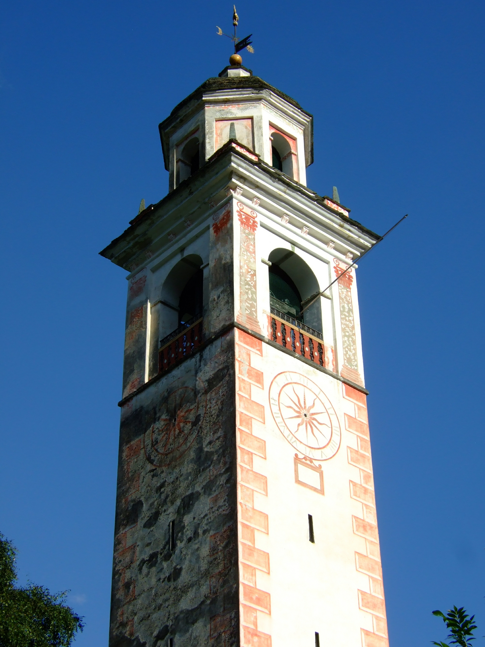 Turm der reformierten Kirche von Poschiavo, Schweiz